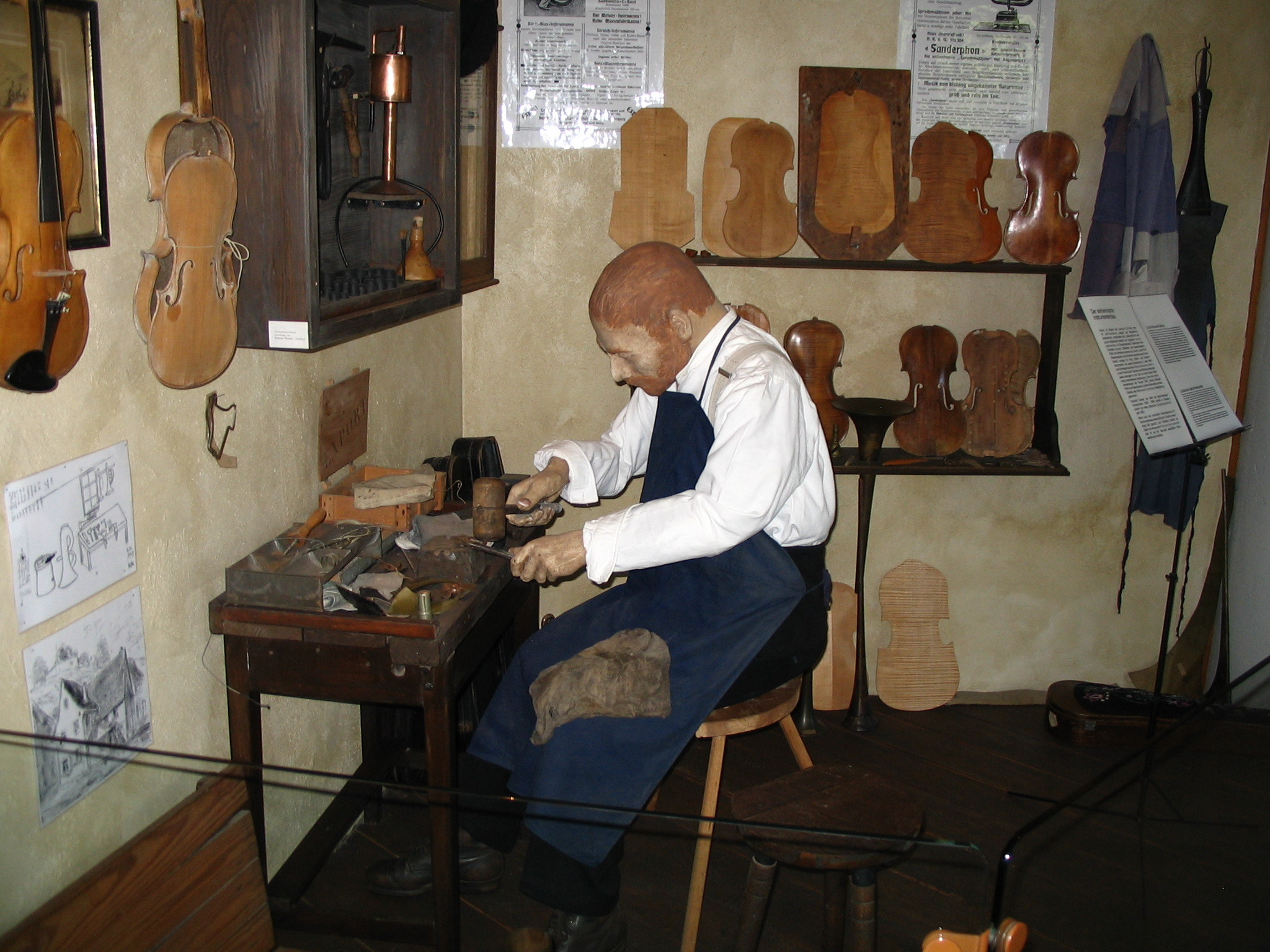 Musikantenlandmuseum Burg Lichtenberg: Werkstatt eines Instrumentenbauers